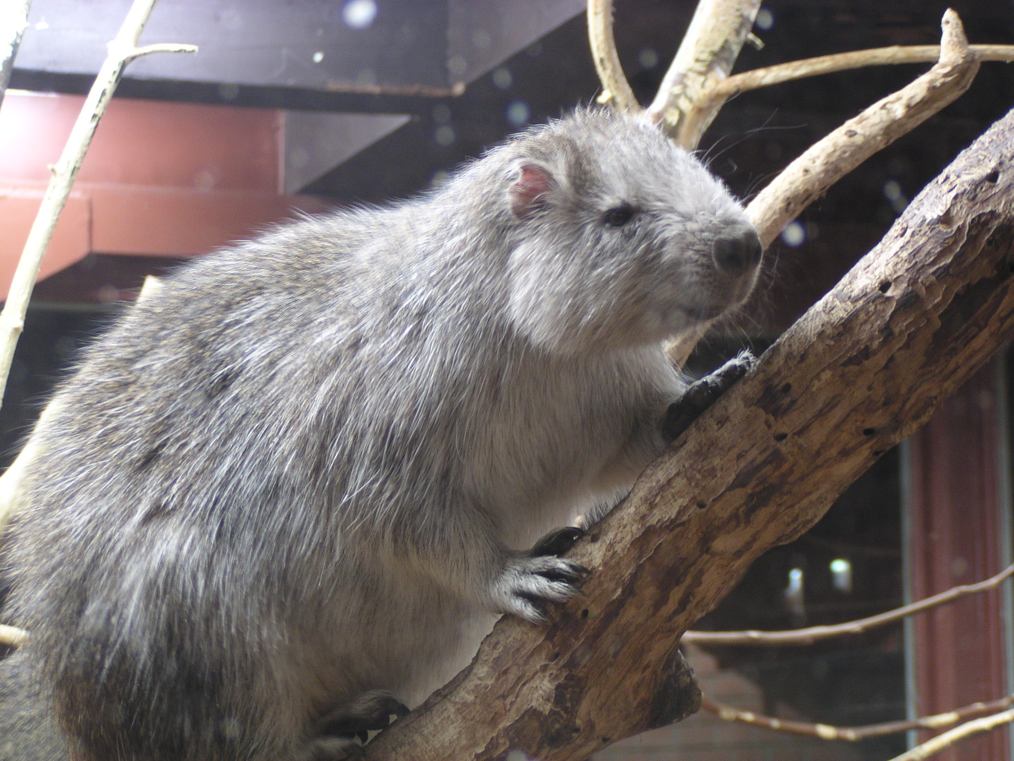 Hutia konga